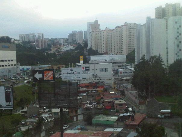 Contraste entre edificios de clase alta y ciudad perdida